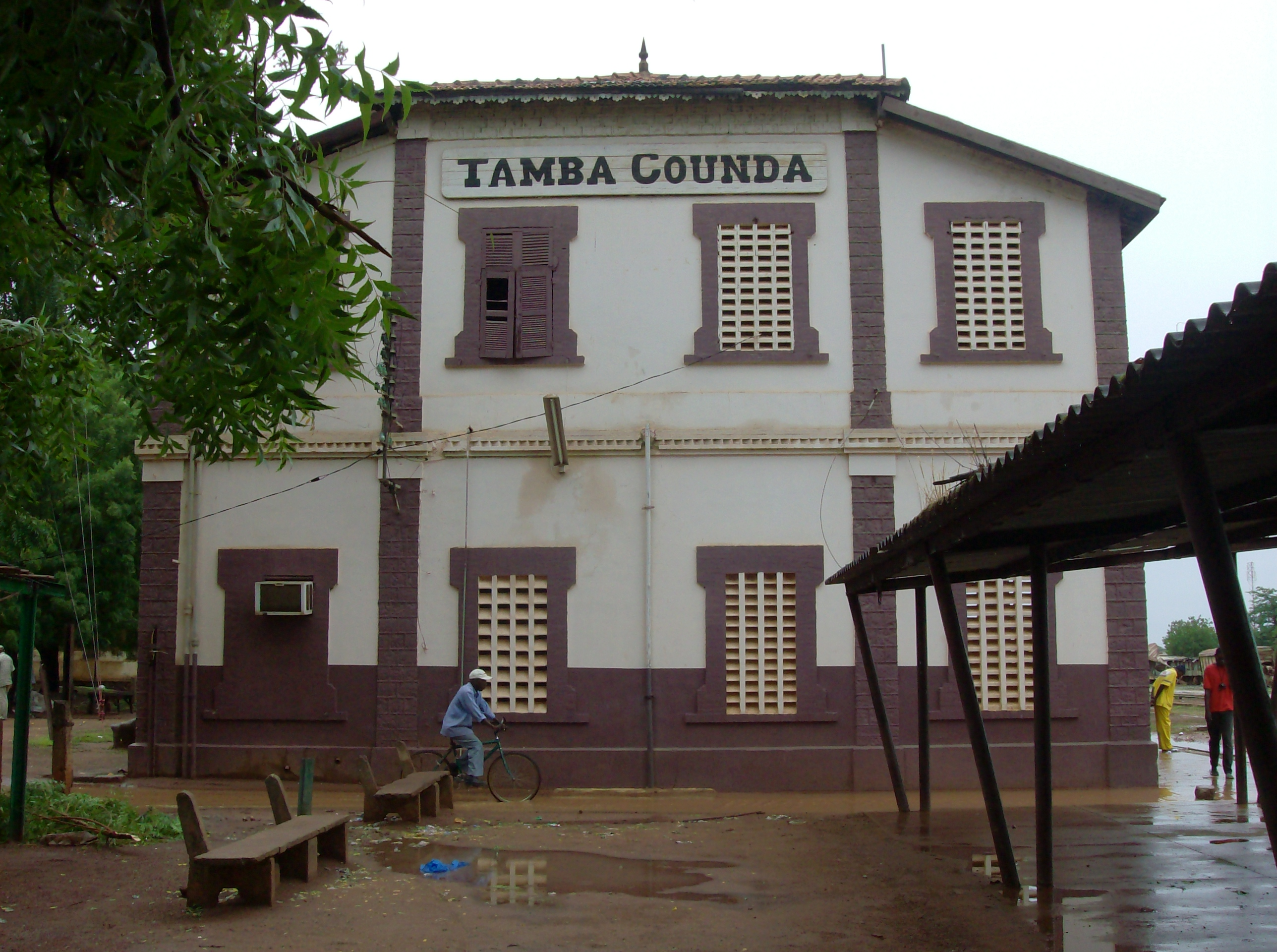 Gambia & Senegal 2009